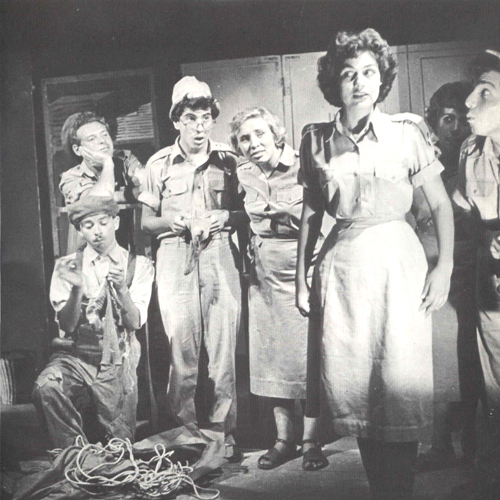 להקת פיקוד צפון בתוכניתם הראשונה "מוישה ונטילטור". יעקב בודו כורע משמאל